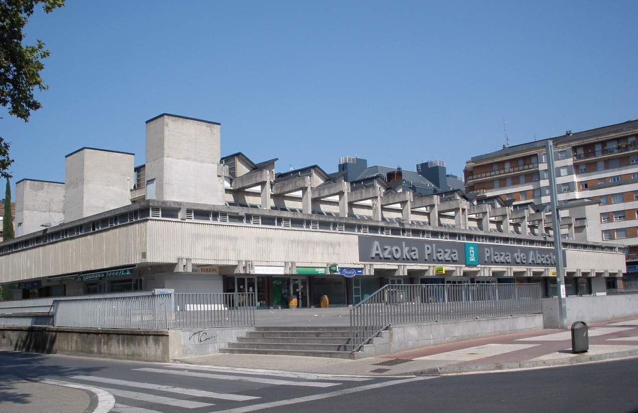 Mercado de La Plaza (Mercado de Abastos), en Vitoria